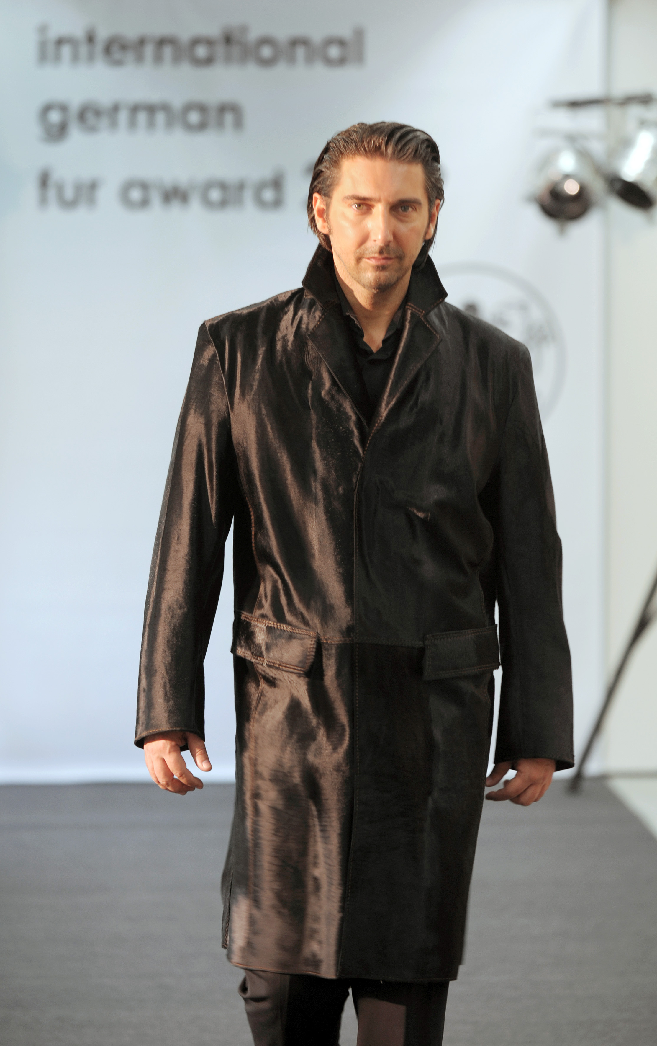 International German Fur Award 2009 des Kürschnerhandwerks. Gruppe "Männer".